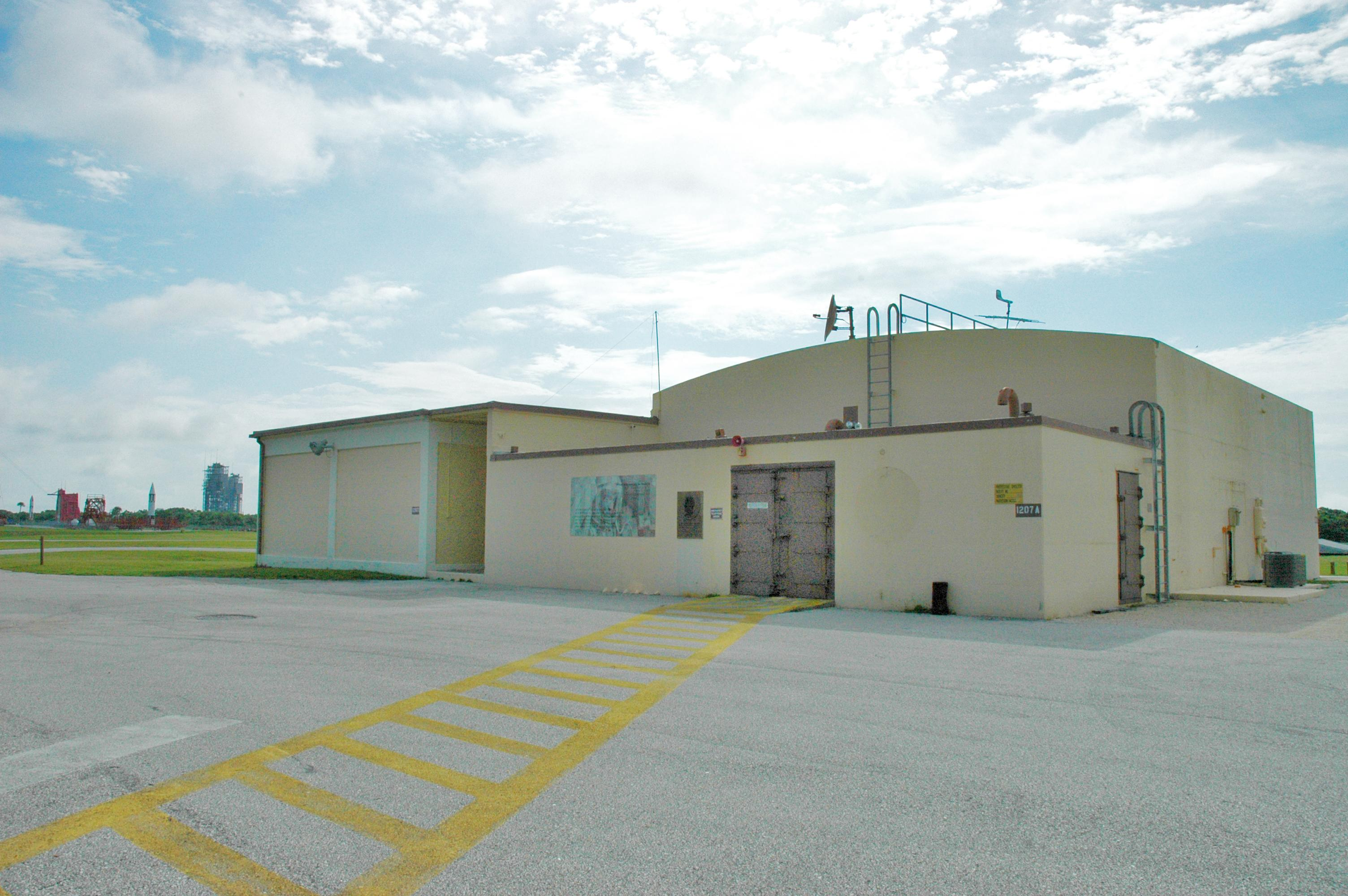 Blockhouse at LC-5 and LC-6 at CCAFS